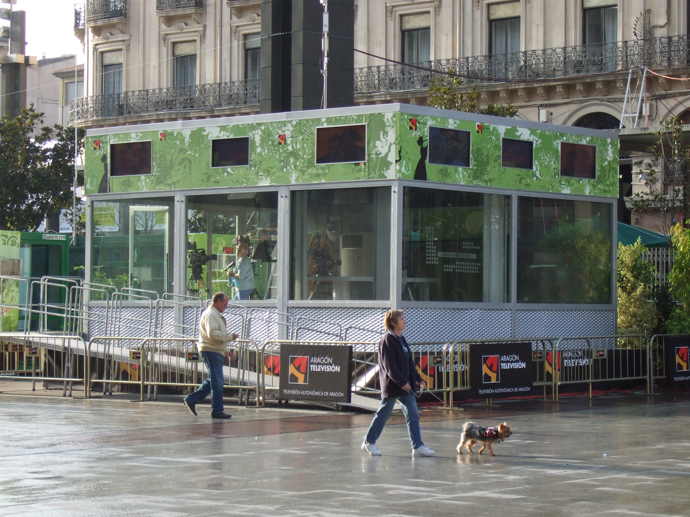 Zaragoza - Contenedor de Aragón Televisión en Plaza del Pilar durante las fiestas del Pilar 2008